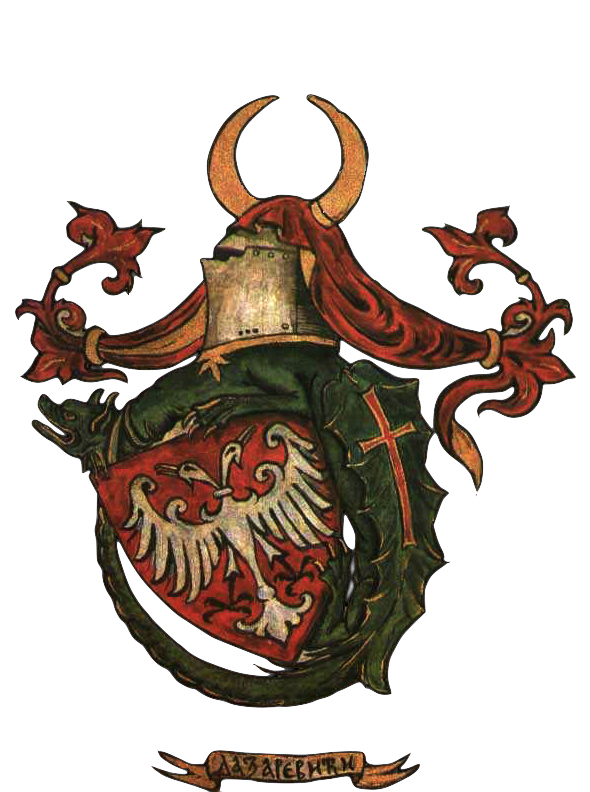 грб Лазаревића Licensing {